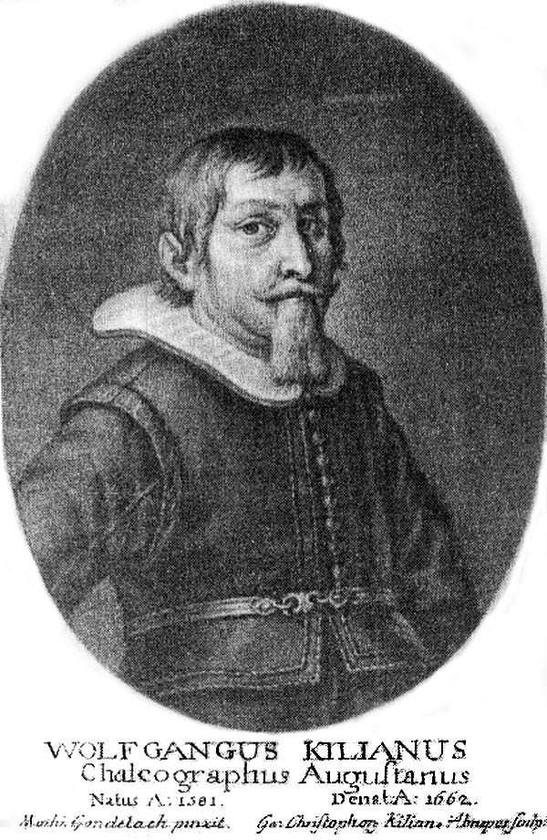 Mezzotint Wolfgang Kilian (1581-1663) German engraver